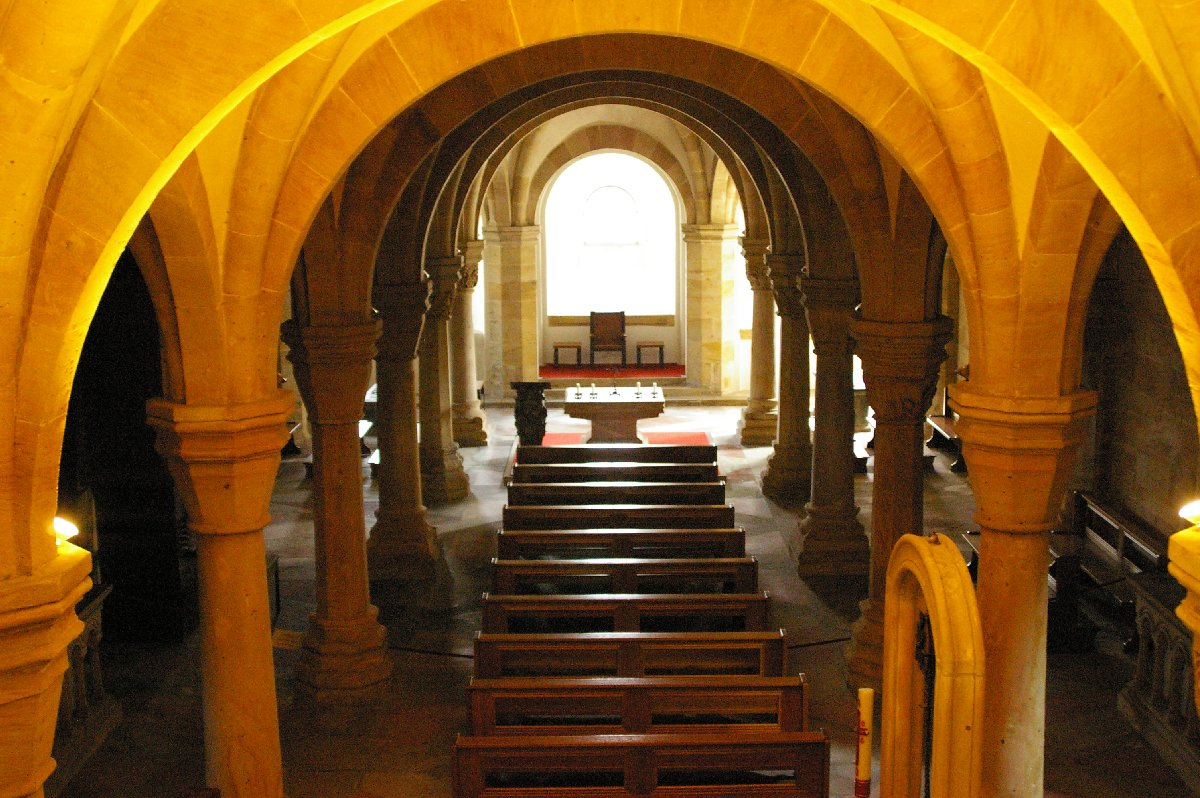 Bamberg-Dom-Krypta